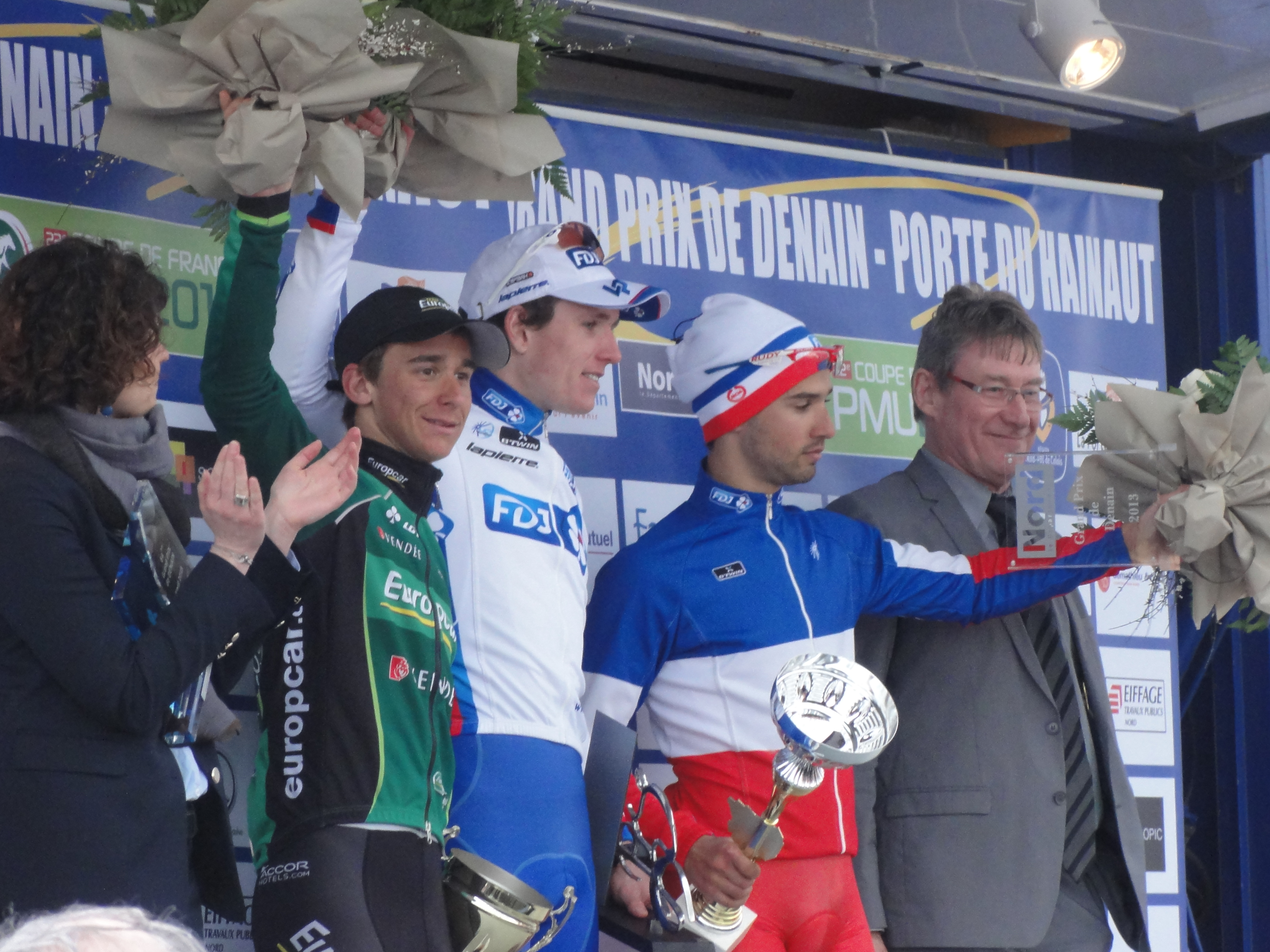 Reportage photographique réalisé le mardi 11 avril 2013 durant l'édition 2013 du Grand Prix de Denain à Denain, Nord, Nord-Pas-de-Calais, France. Depicted people: Bryan Coquard, Arnaud Démare and Nacer Bouhanni